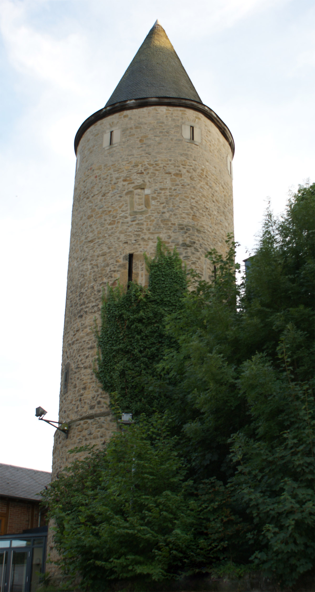 Den Tuerm aus dem 15. Joerhonnert vun der Abtei Almënster.